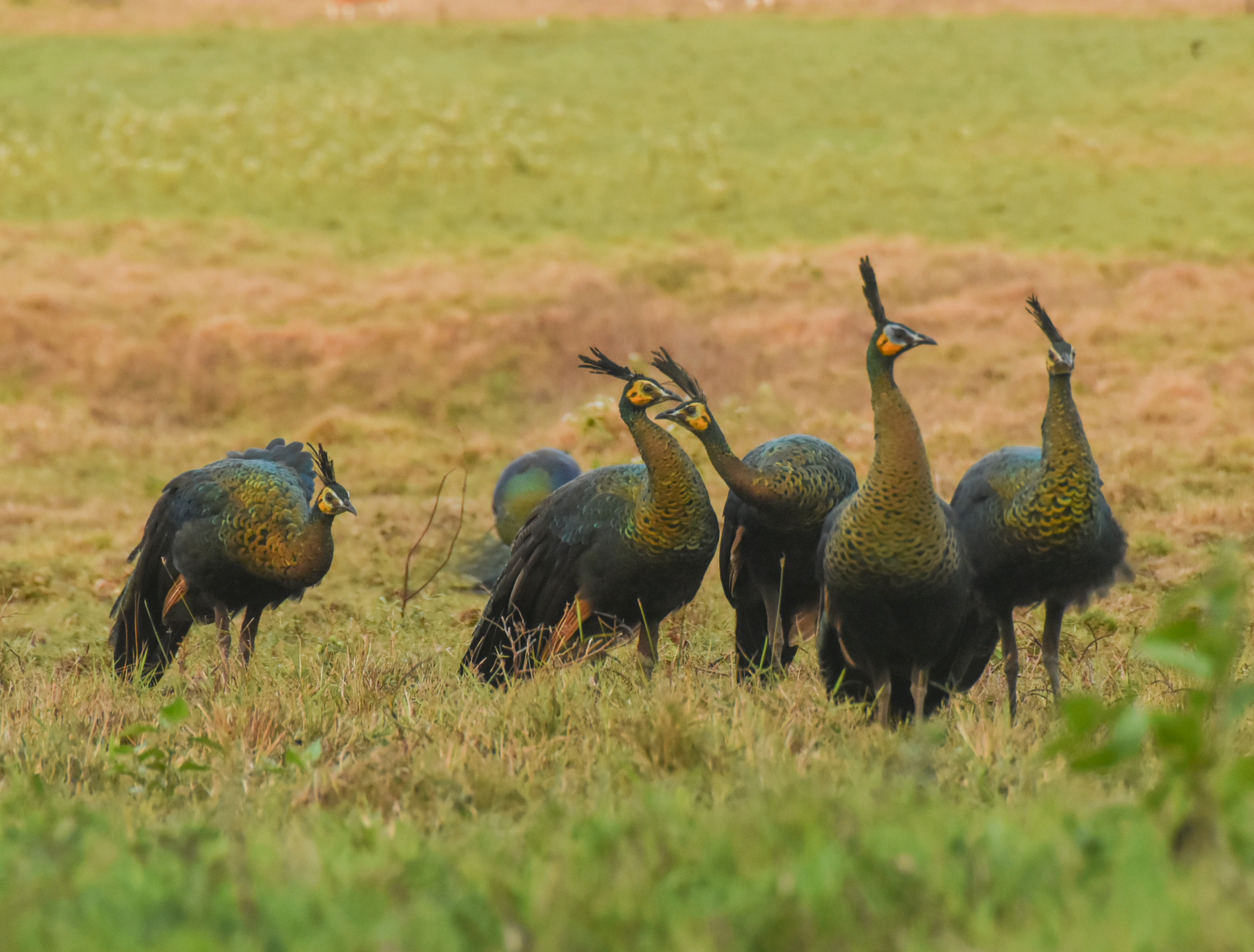 Merak jawa adalah salah satu satwa endemik jawa, status konservasinya terancam punah, merak jawa bisa di temui di Taman Nasional Alas Purwo, Taman Nasional Baluran,Taman Nasional Ujung Kulon dan beberapa wilayah dilindungi lain